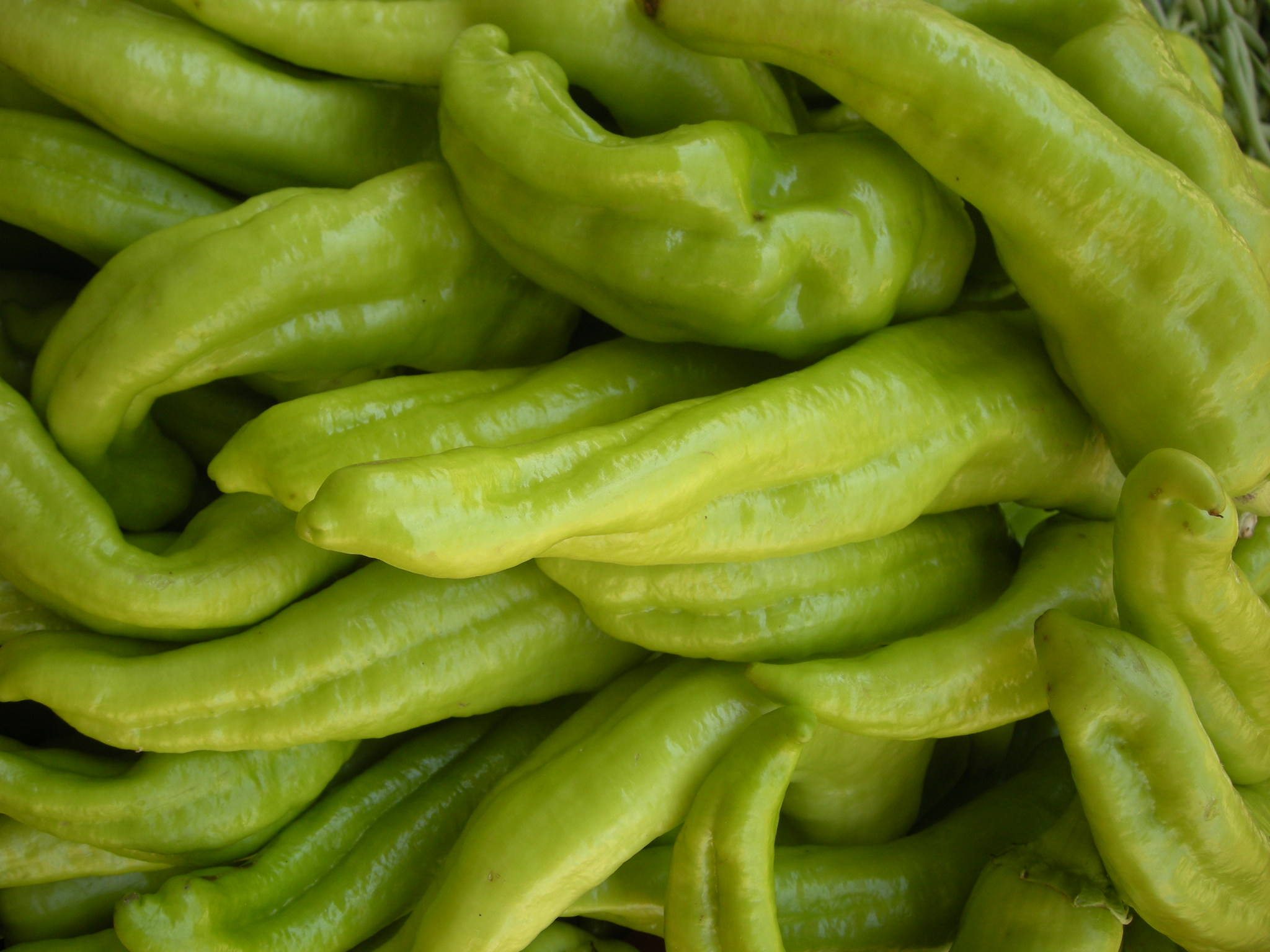 Pebre tendre (Capsicum baccatum). Foto feta al mercat de les verdures de Manacor.